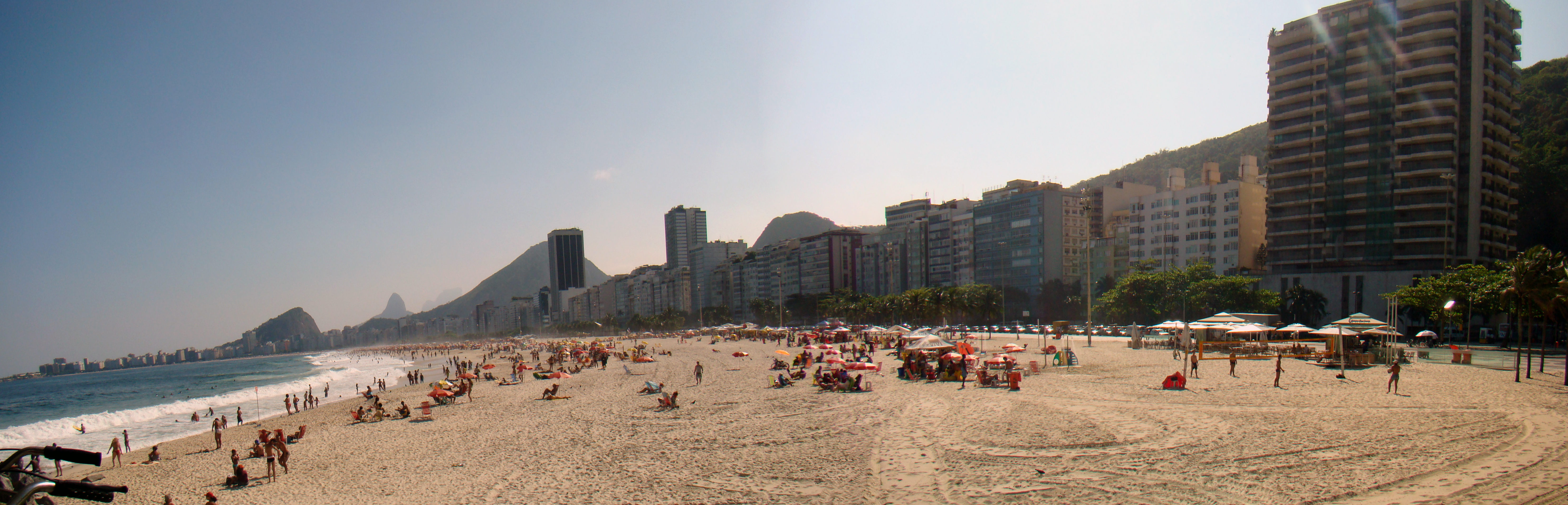 A praia de Copacabana localiza-se no bairro de mesmo nome, na zona Sul da cidade do Rio de Janeiro, no Brasil.